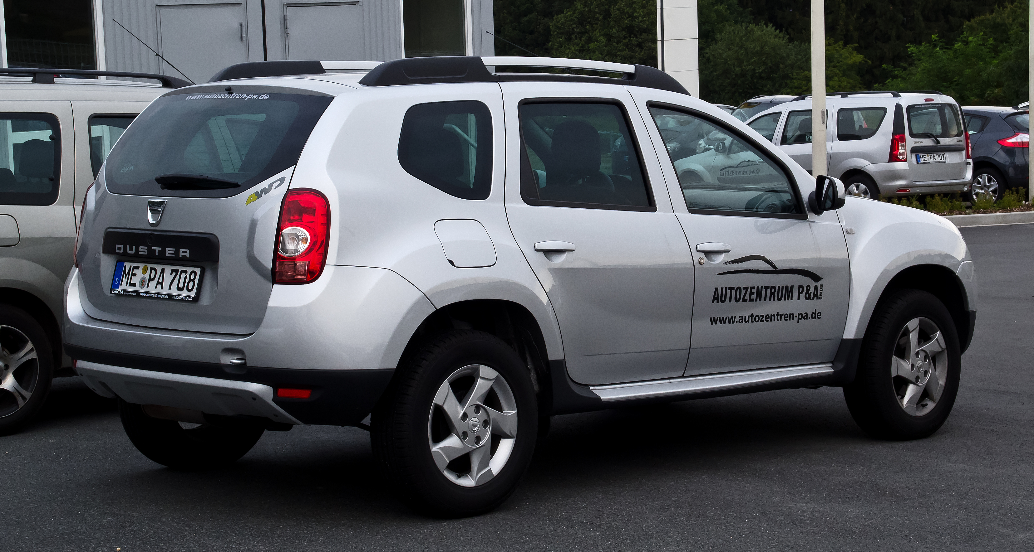 Dacia Duster 105 4x4 Prestige